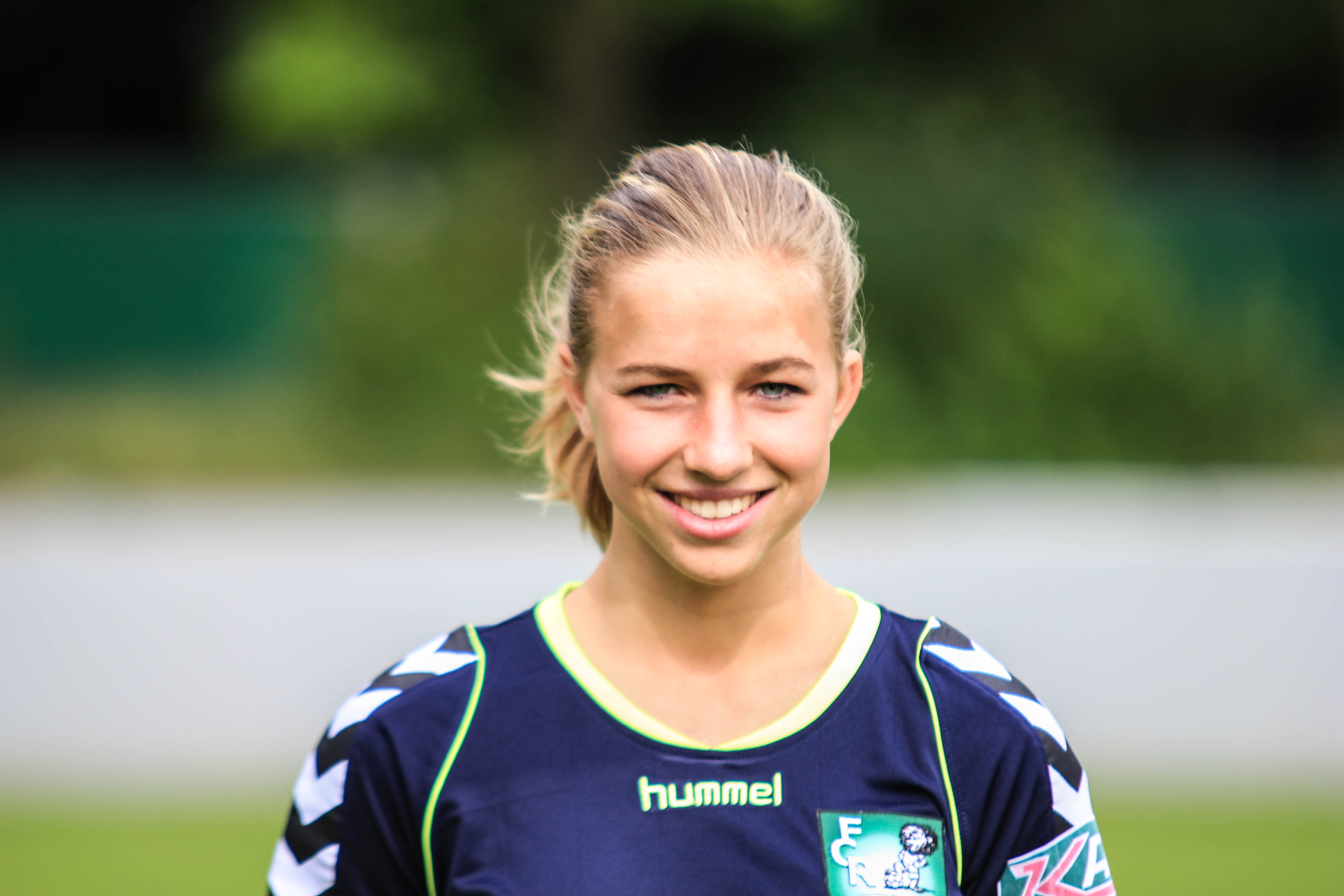 Jackie Groenen, FCR 2001 Duisburg